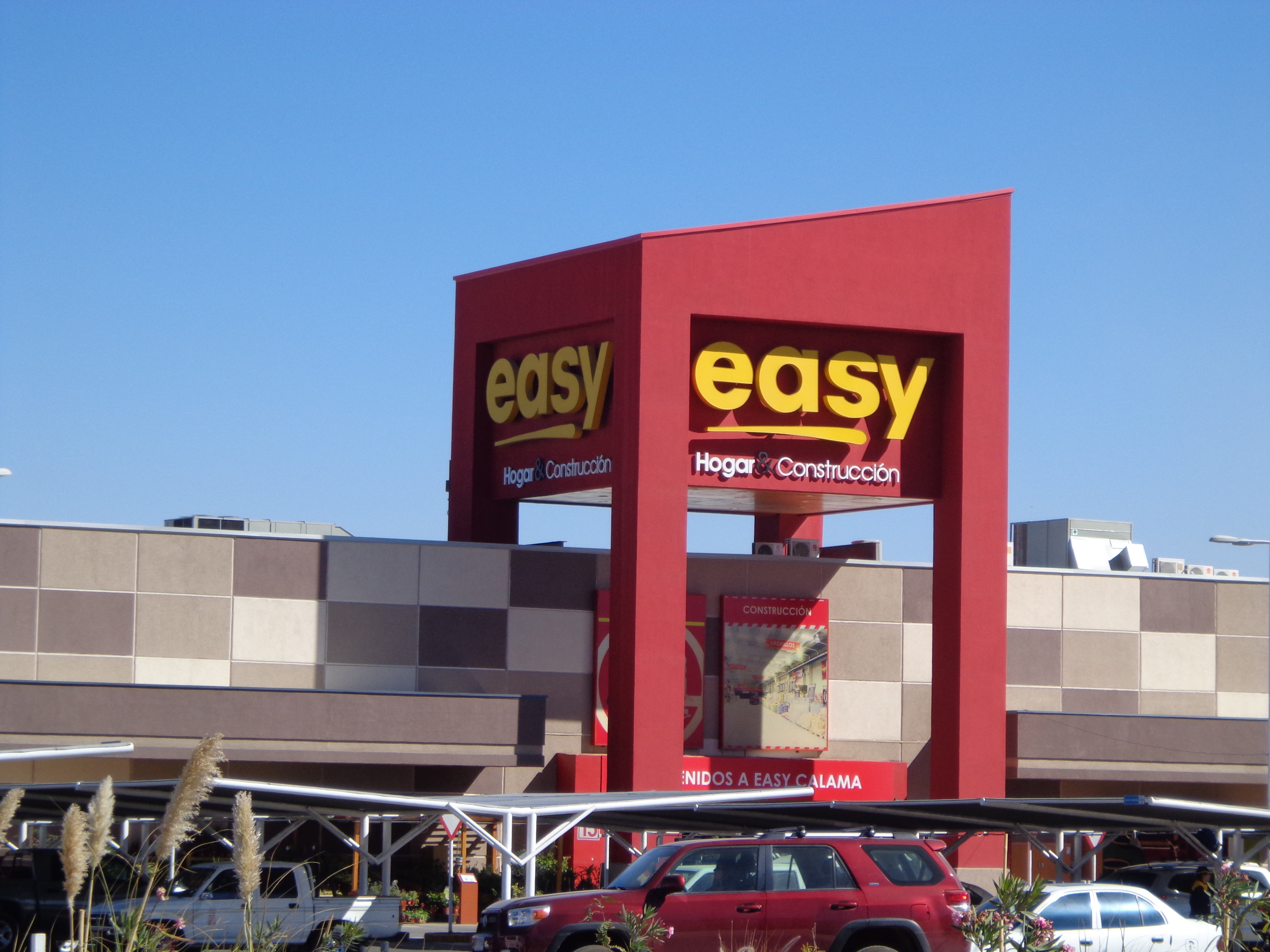 Fachada del edificio del Easy en Calama